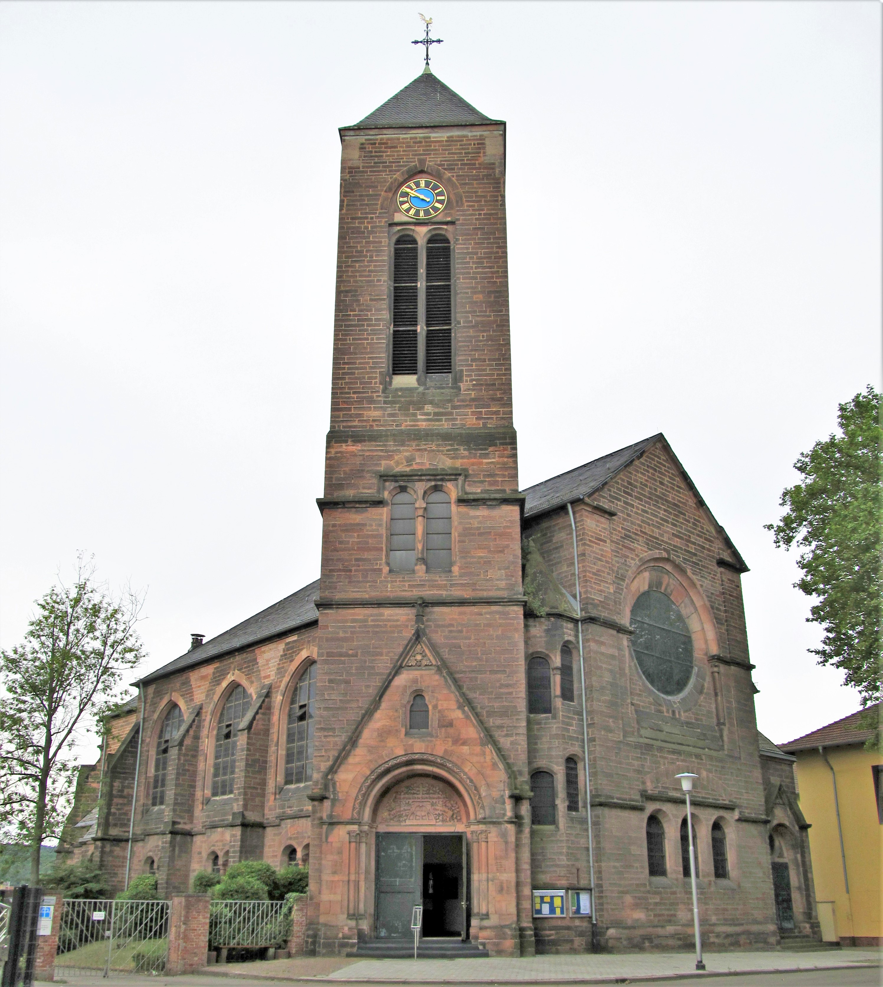 Evangelische Matthäuskirche, Burbach, Saarbrücken, Saarland